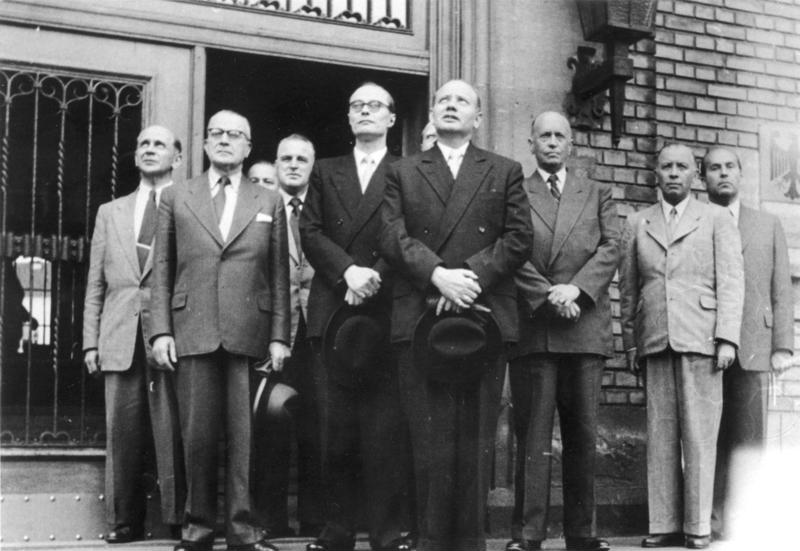 Amt Blank.- Flaggengruß (vlnr: Loosch, Wirmer, Blank, Holz, Heusinger) 5. Mai 1955